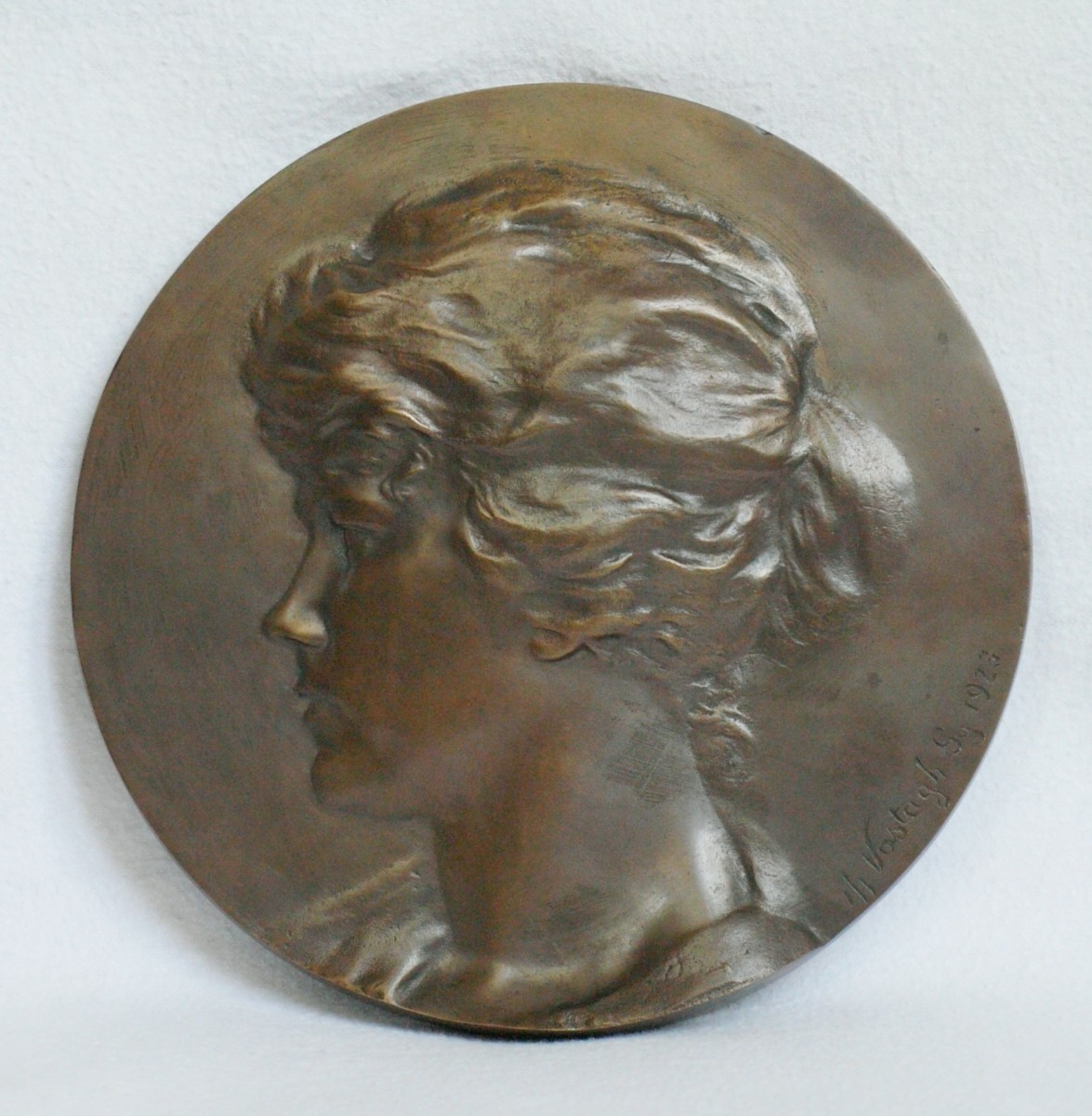 Fotó ifj. Vastagh György dr. Sturm Jozefint ábrázoló plakettjéről